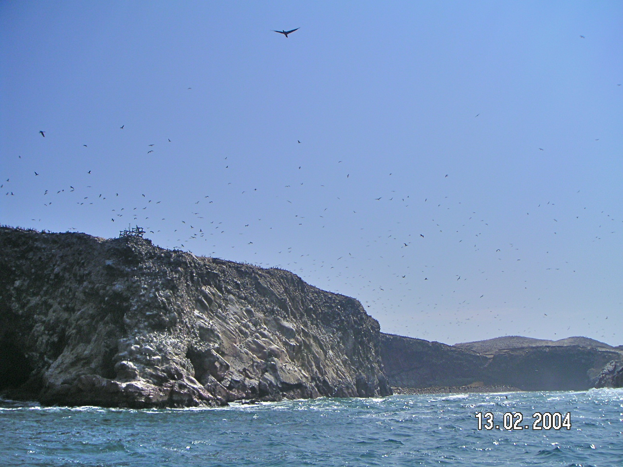 Islas Ballestas